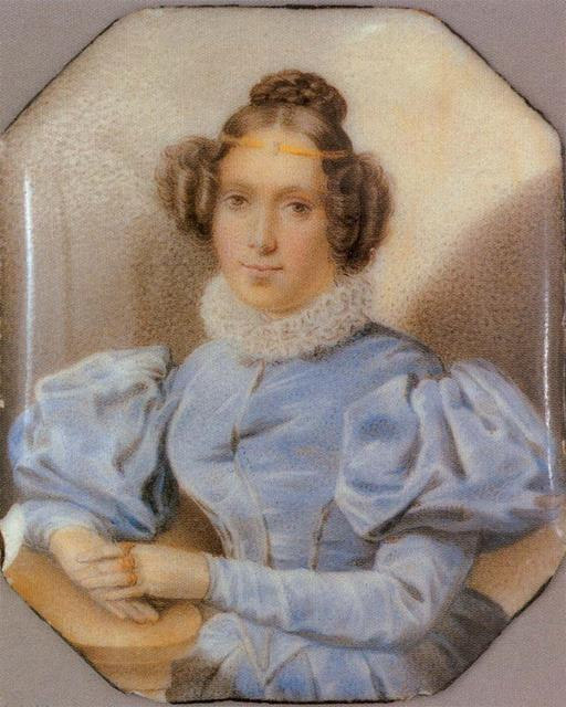 Софья Борисовна Полторацкая, ур. Голицына (15.08.1795 - 19.11.1871), фрейлина.